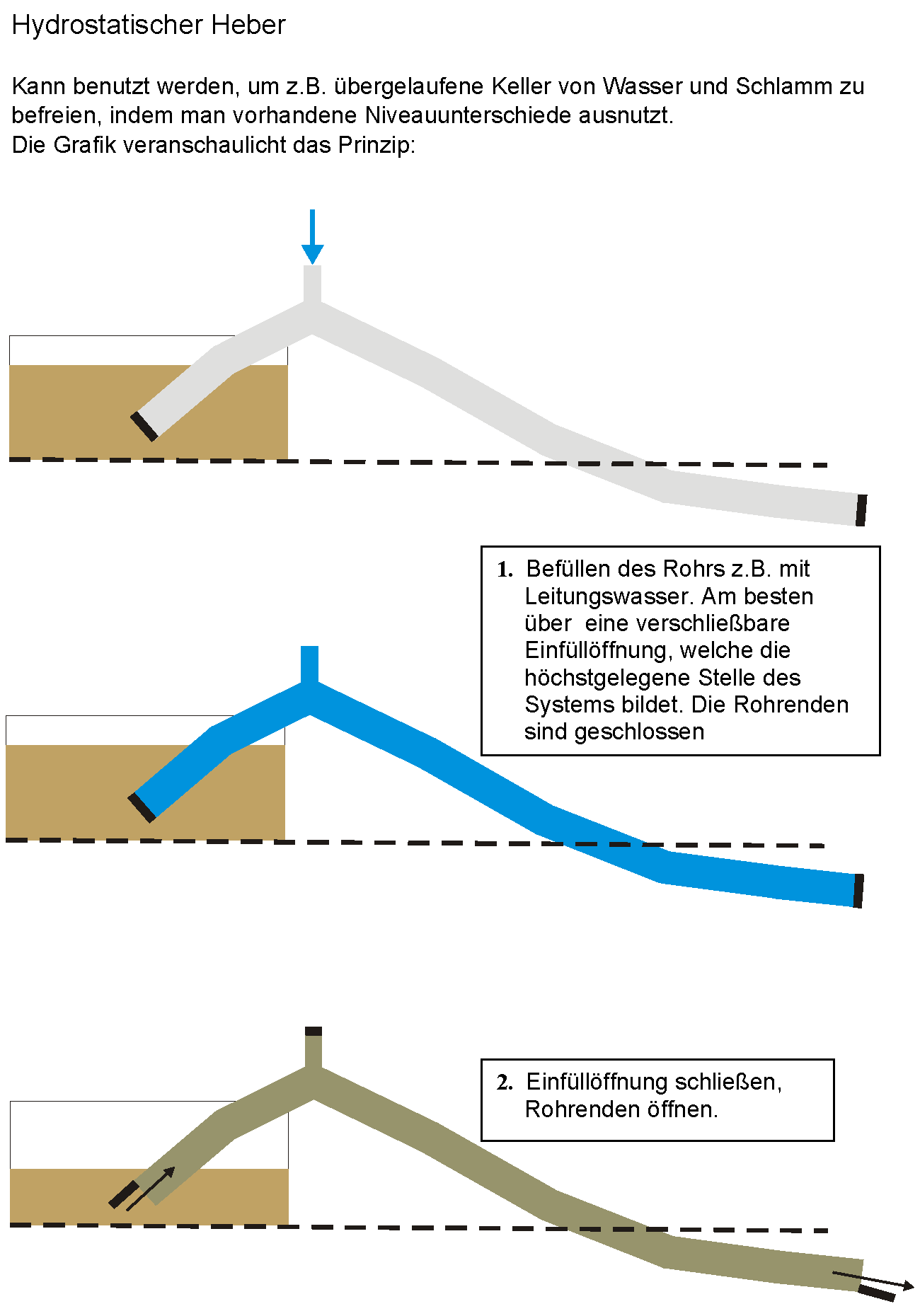 Entleerung überfluteter Keller durch Einsatz des Heber-Prinzips